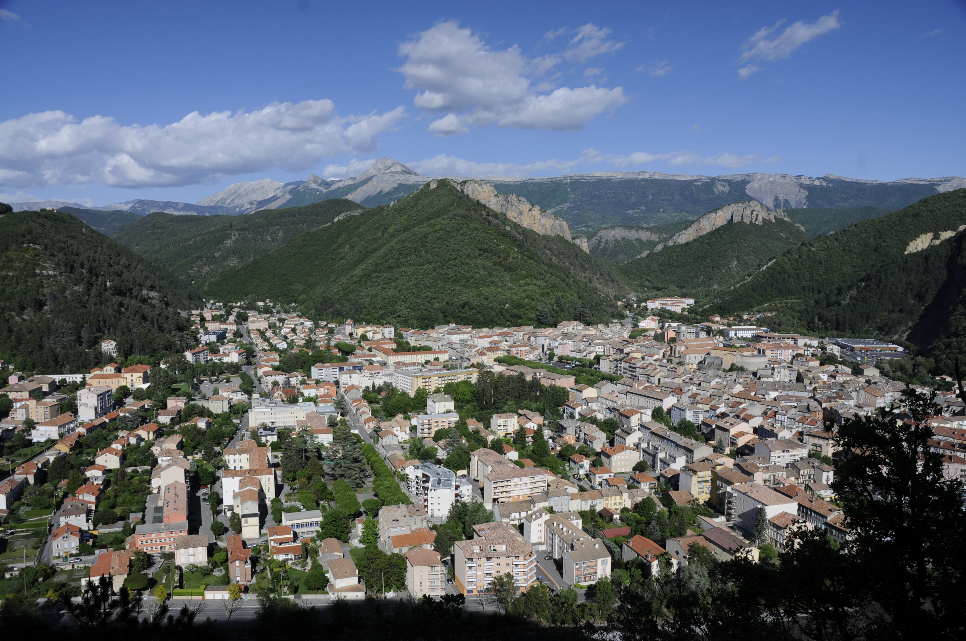 Vue générale de la ville de Digne-les-Bains préfecture des Alpes de Haute-Provence